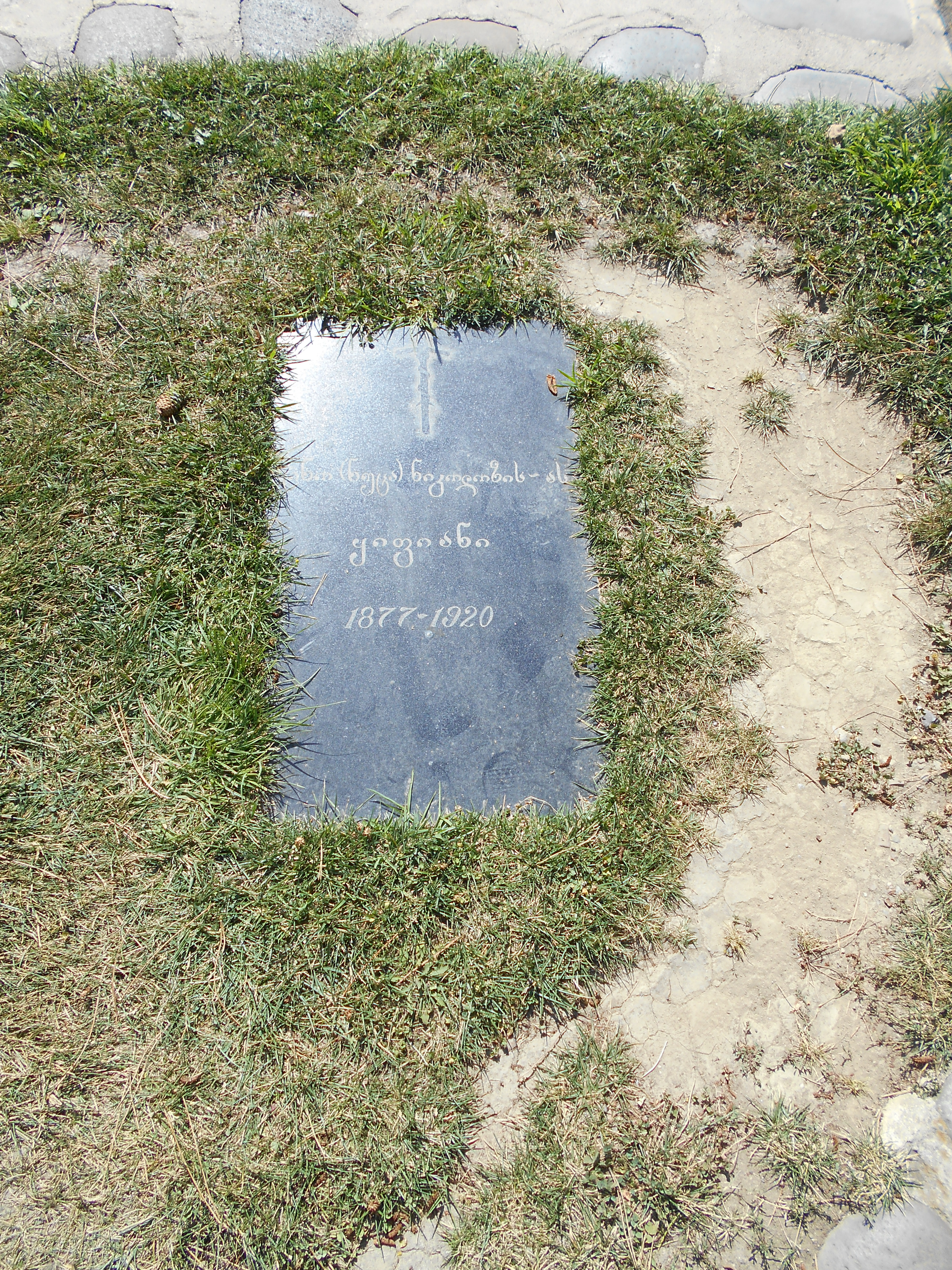 ნინო ნიკოლოზის ასული ყიფიანი (1877-1920) - ქართველი იურისტი, პოლიტიკოსი, ეროვნულ-განმათავისუფლებელი მოძრაობის ერთ-ერთი მესვეურის დიმიტრი ყიფიანის შვილიშვილი.